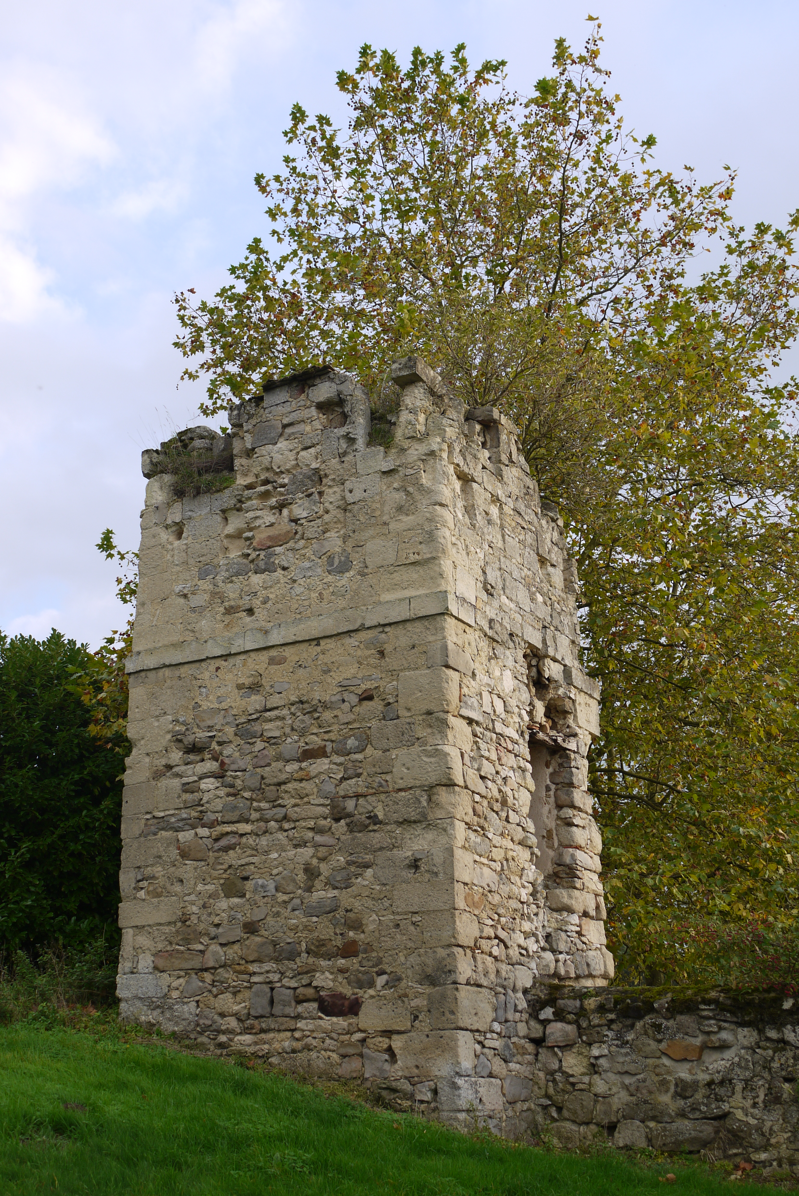 Château de Marizy-Saint-Mard, reste du rempart.